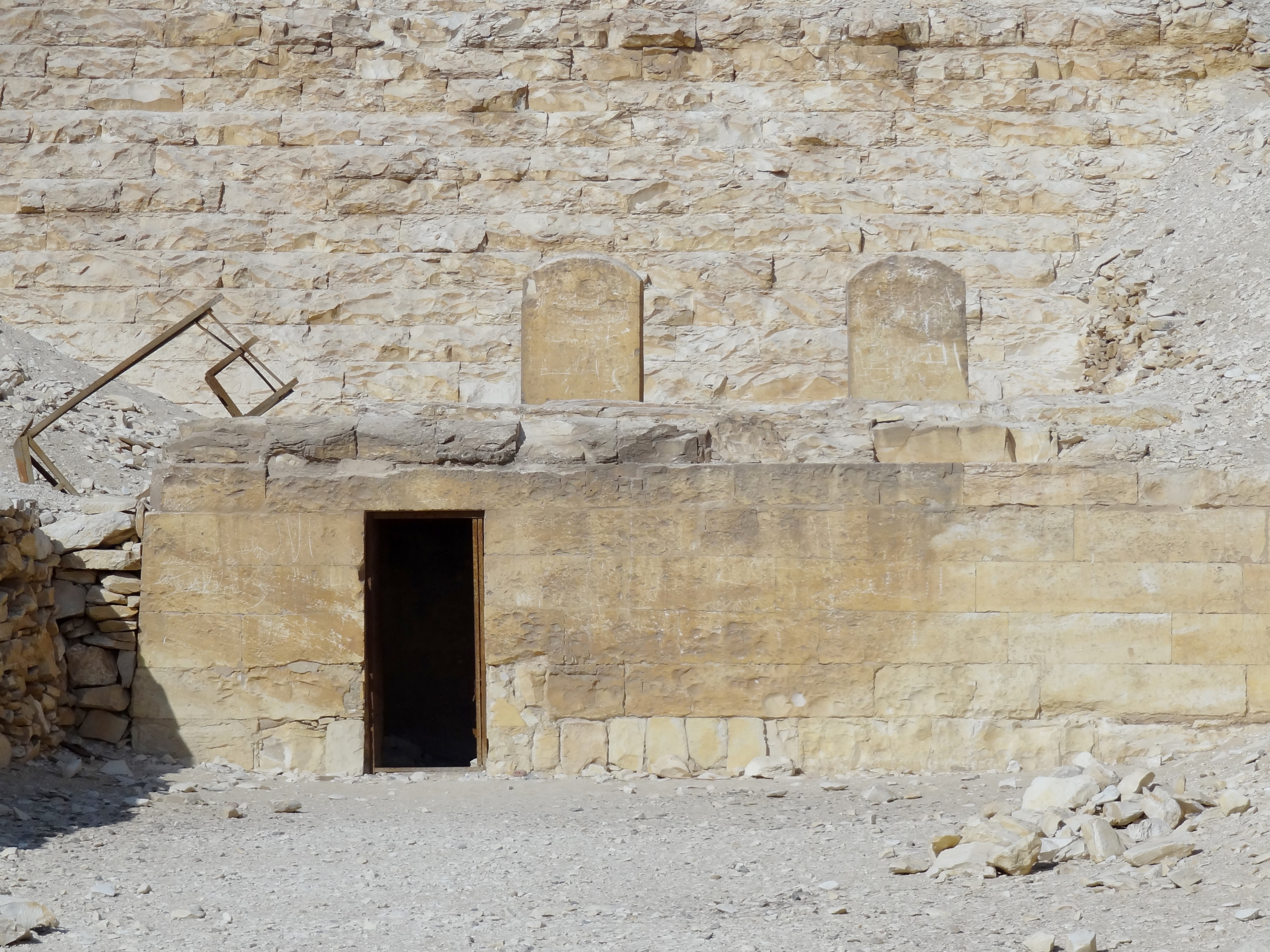 Pyramide von Meidum, Ägypten